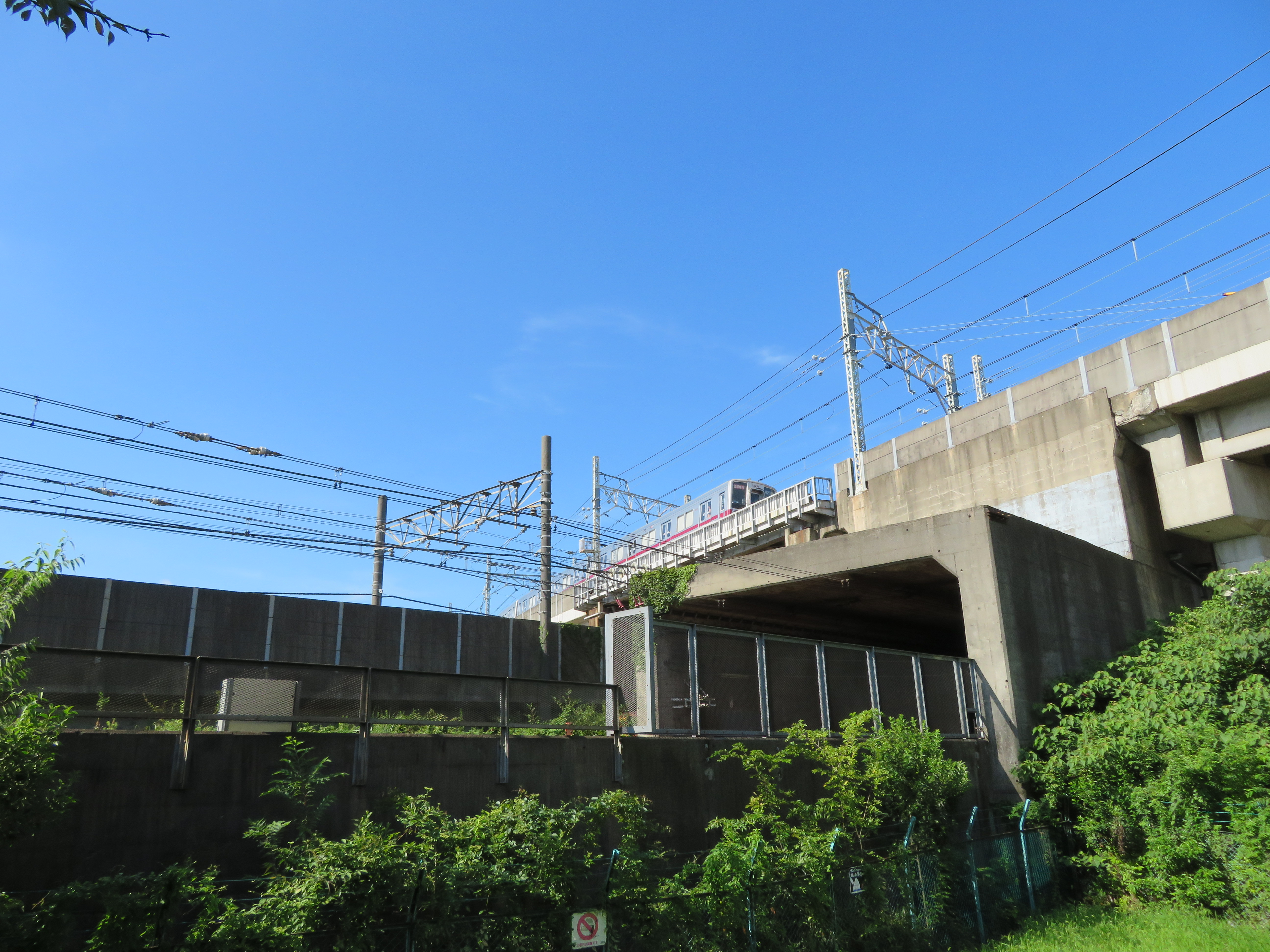 東武伊勢崎線（写真上）とＪＲ常磐快速線（写真奥）東京地下鉄千代田線（ＪＲ常磐緩行線）（写真手前）との交差部分 Canon PowerShot SX720 HS